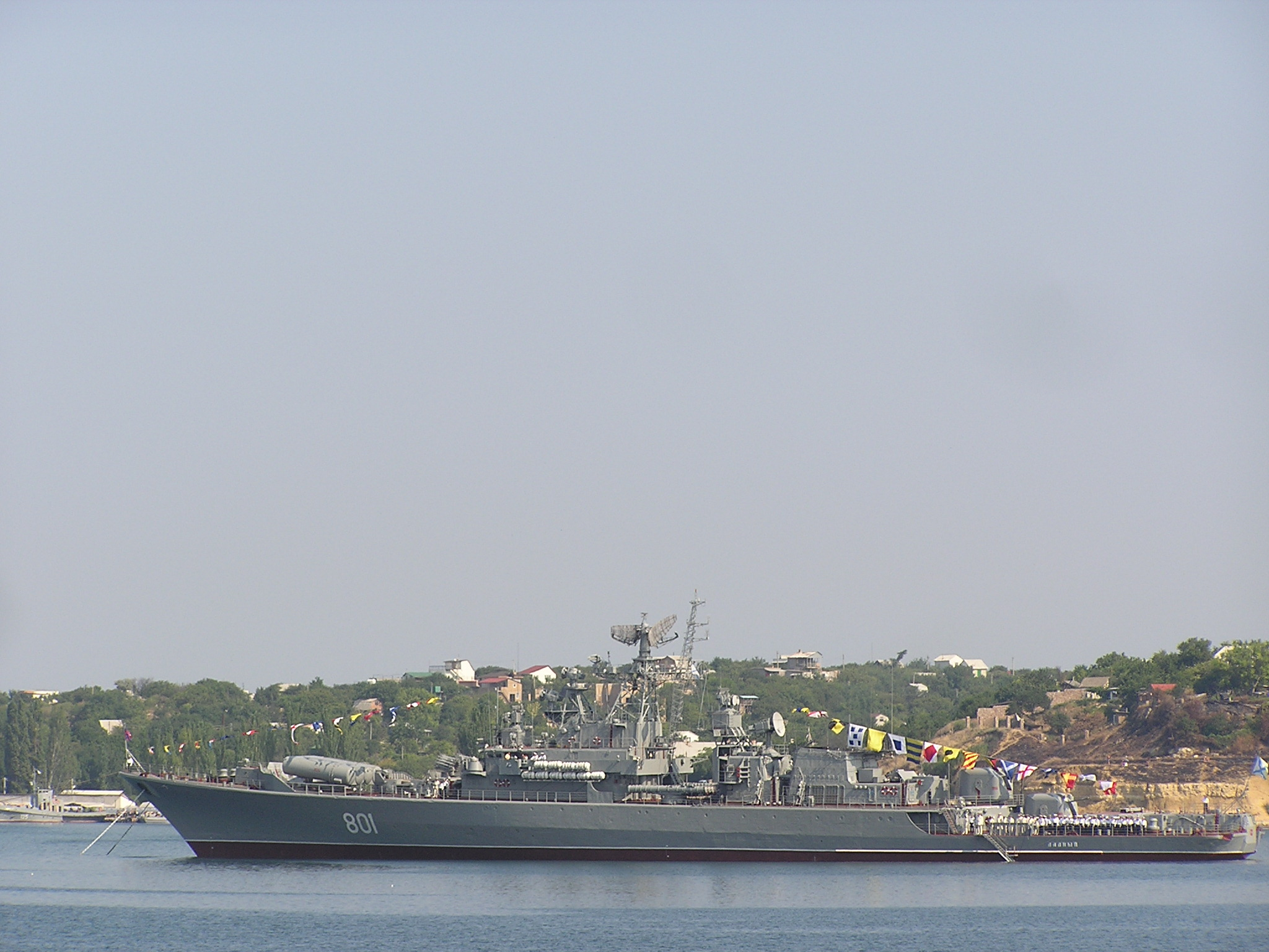 Севастополь